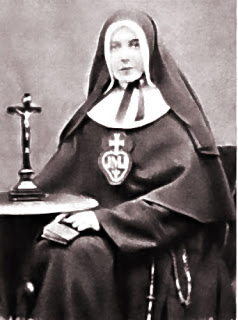 Portrait d'Elizabeth Prout, alias Mère Marie-Joseph de Jésus.